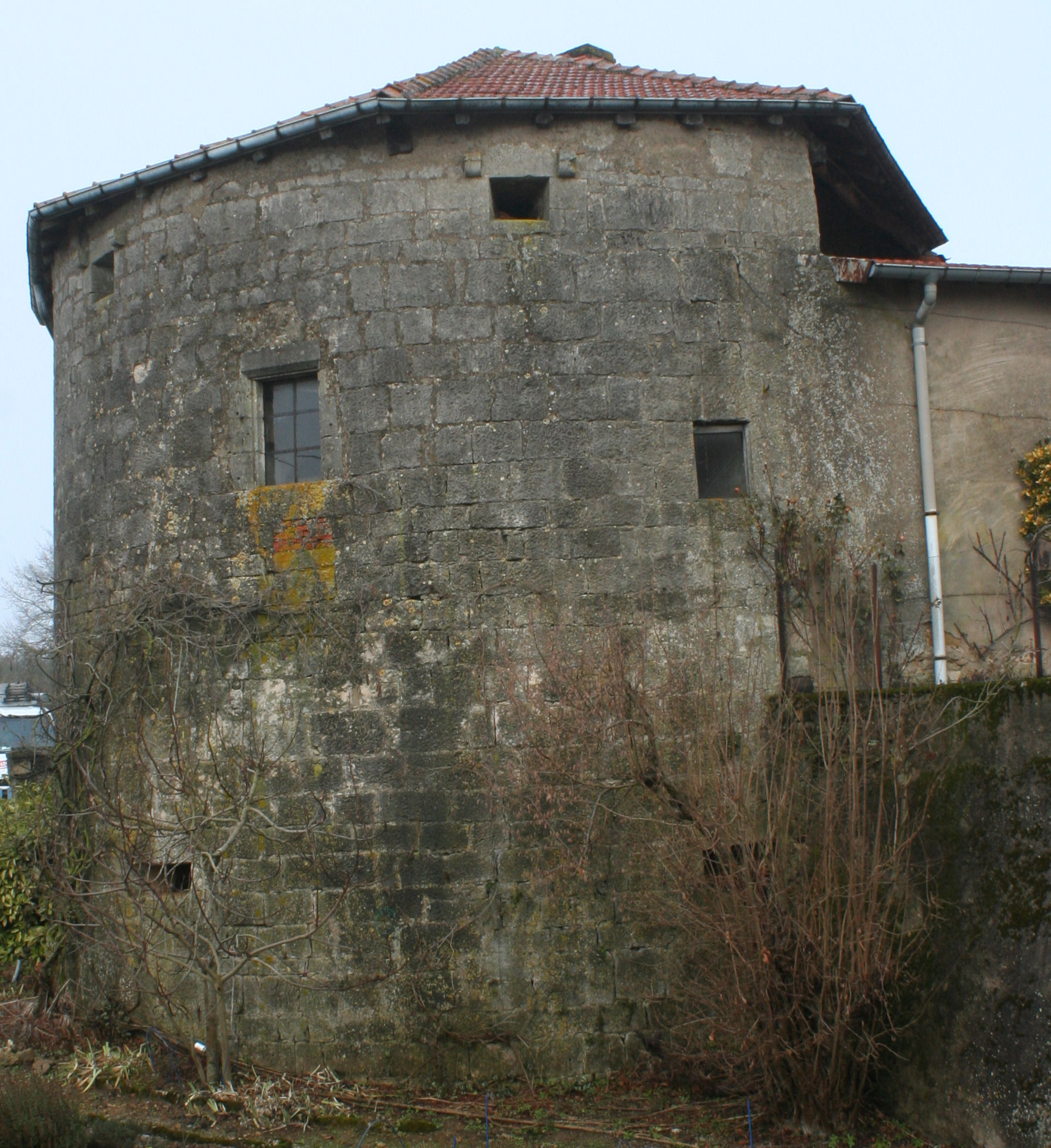 Maison forte de Germiny-Haut, tour d'artillerie ouest.